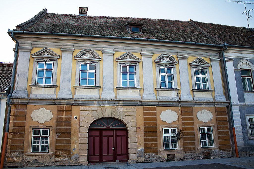 Strada Andrei Șaguna, mitropolit 3, Alba Iulia, interiorul Cetății Alba Carolina